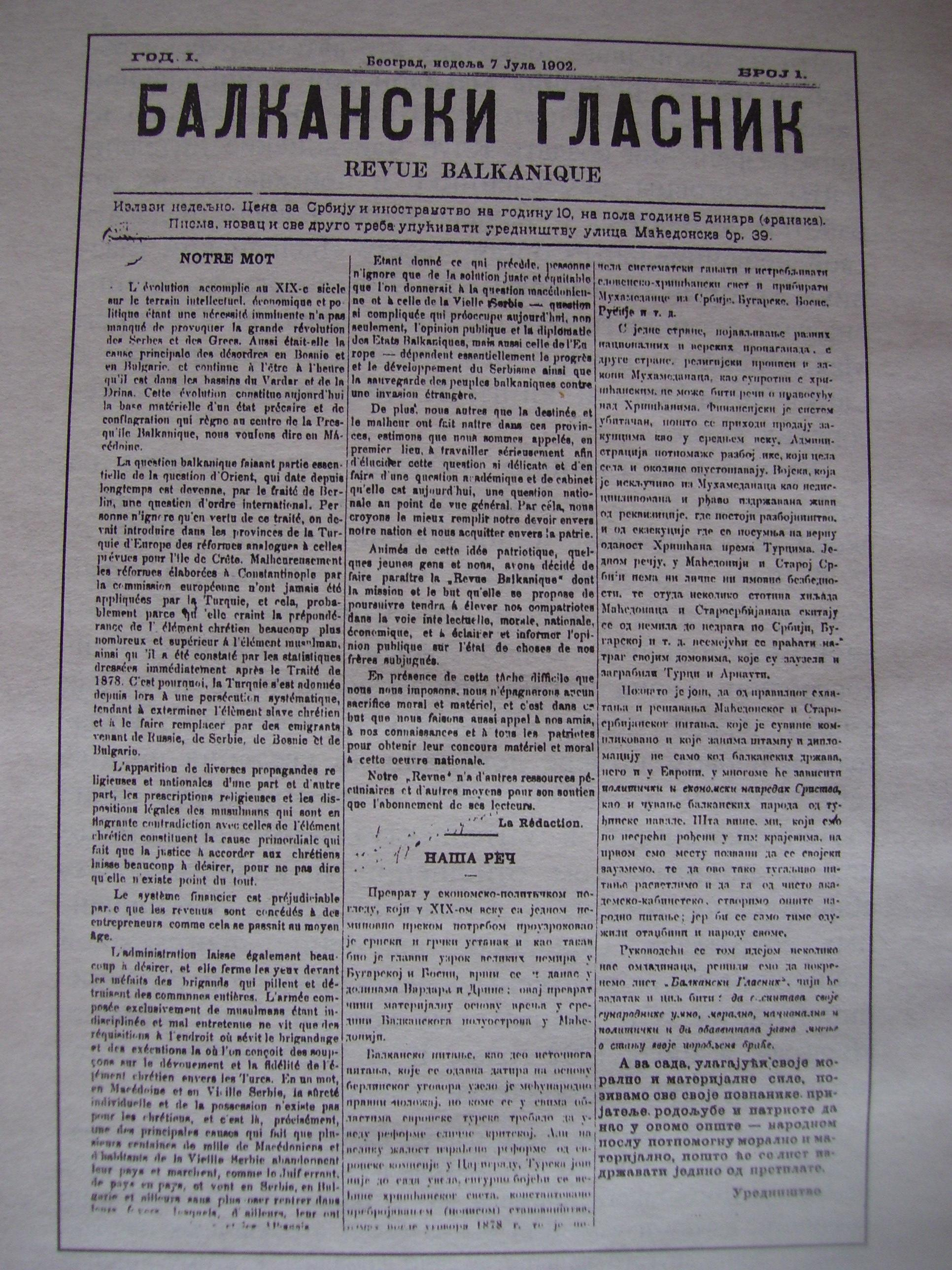 Брой на вестник "Балкански гласник"